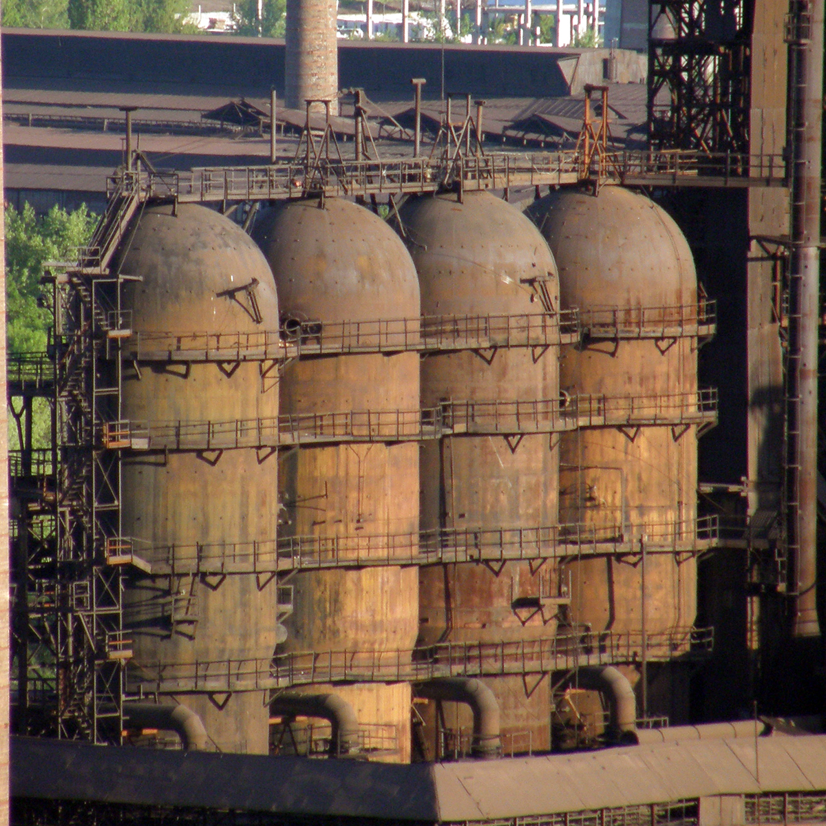 Краматорск